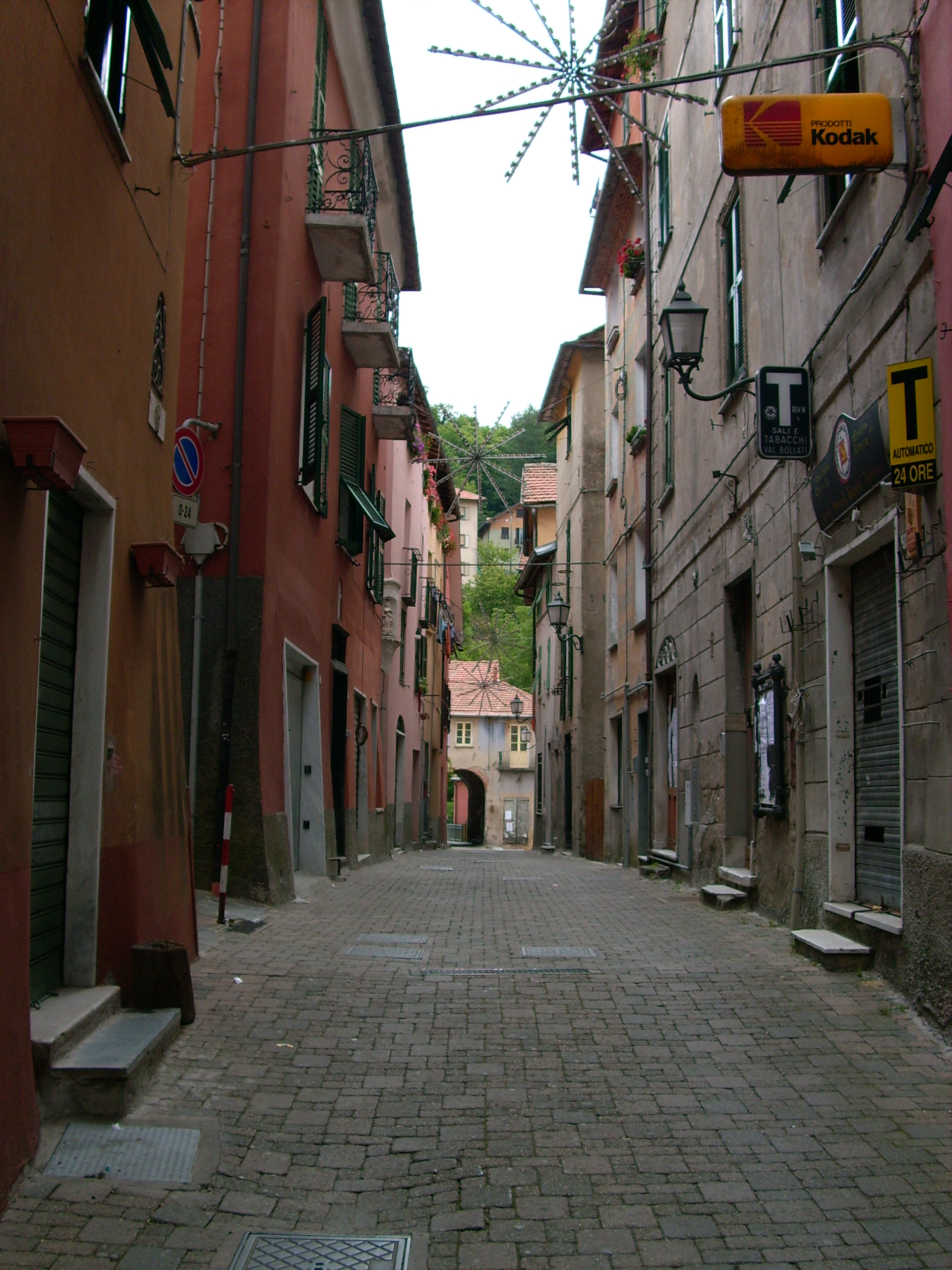 Centro storico di Torriglia, Liguria, Italia